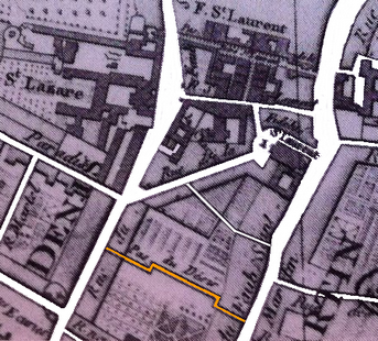 Passage du Désir avant la création de l'impasse de la Fidélité, qui sera transformée en rue Neuve de la Fidélité, puis deviendra en 1853 le boulevard de Strasbourg.